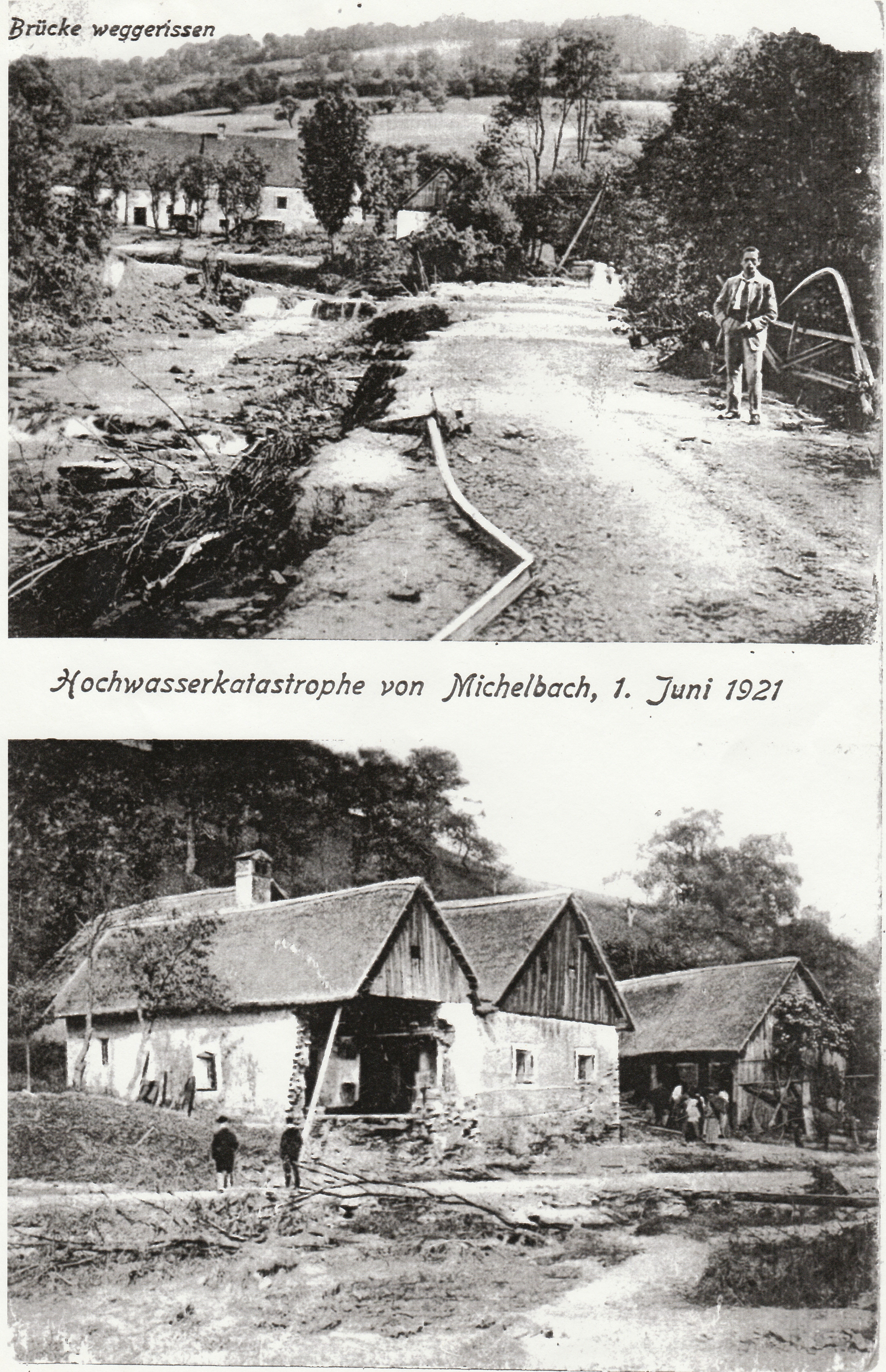 Am 1. Juni 1921 wurde Michelbach von einem furchtbaren Hochwasser heimgesucht. Wie Wassermassen wälzten sich meterhoch auf Straßen und Wegen und verwüsteten den Ort in einem unvorstellbarem Ausmaß. Die Durlassstraße wurde an mehreren Stellen total abgerissen. Ab oberen Bild zu sehen ist die Kreuzung bei der Jägerbrücke, am unteren Bild die Engstelle an der L132 Richtung Klein Durlas (heute Fam. Moser).